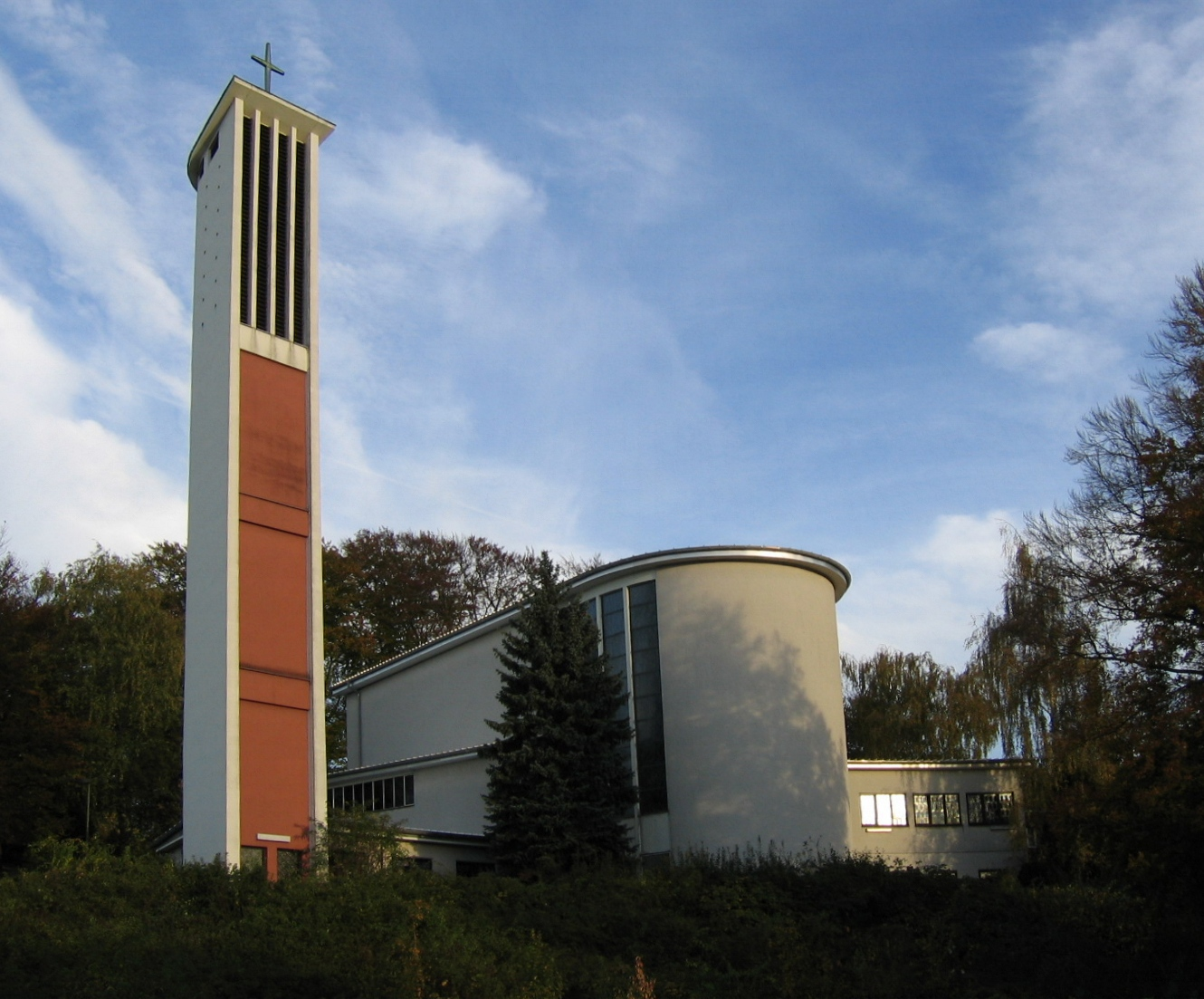 Katholische Kirche "Heilige Dreifaltigkeit" in Iserlohn-Wermingsen, Schulstraße.